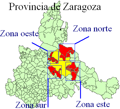 Área metropolitana de Zaragoza